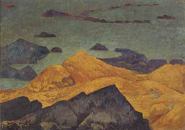 Picture: "Bords de Mer" by Paul Sérusier